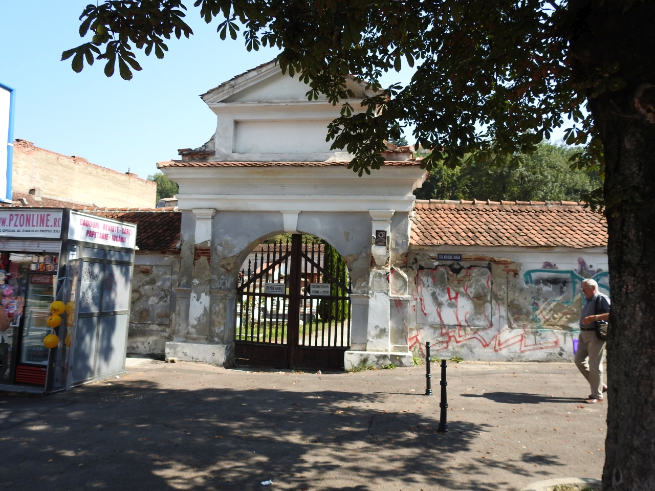 Zid de incintă 03